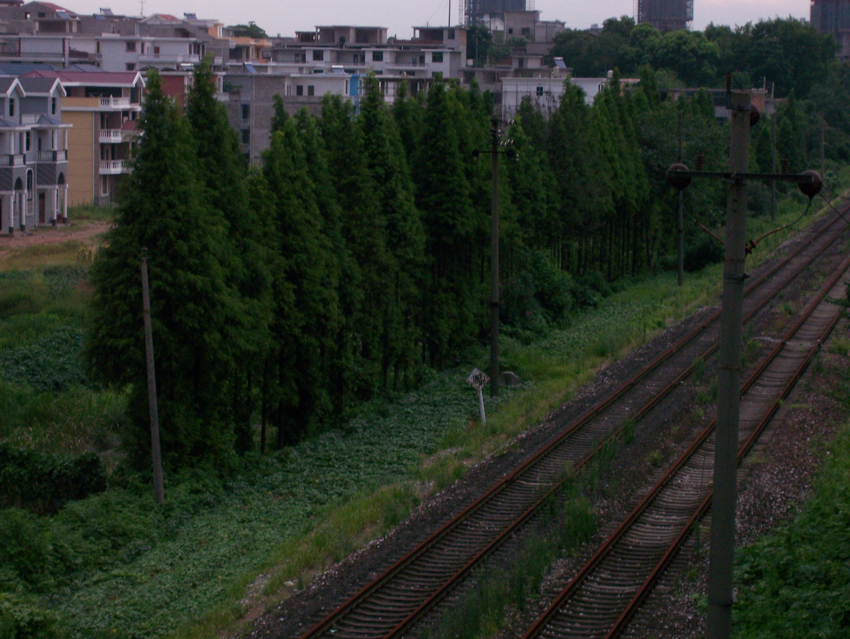 铁路和铁路旁的房子